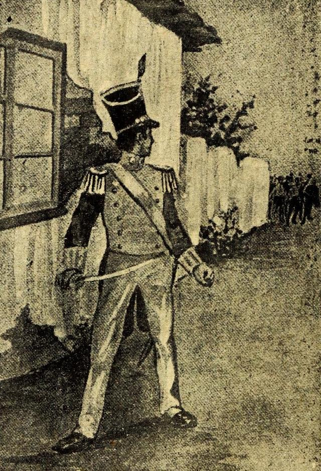 Soldado Talavera atacado por el pueblo. En Historia de Chile para la enseñanza primaria en Valdes Vergara, Francisco, 1854-1916